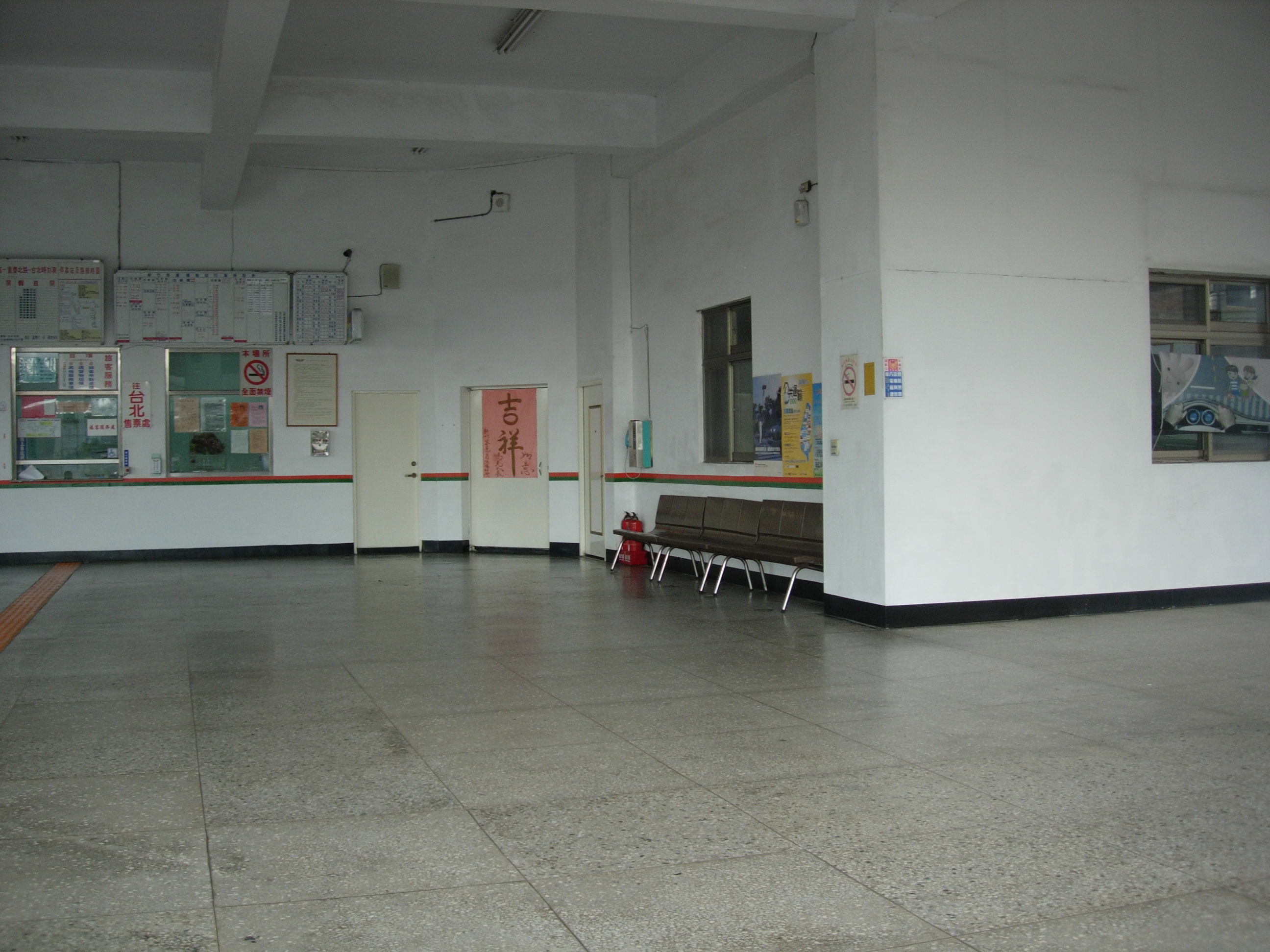 中文（台灣）: 新竹客運楊梅站大廳